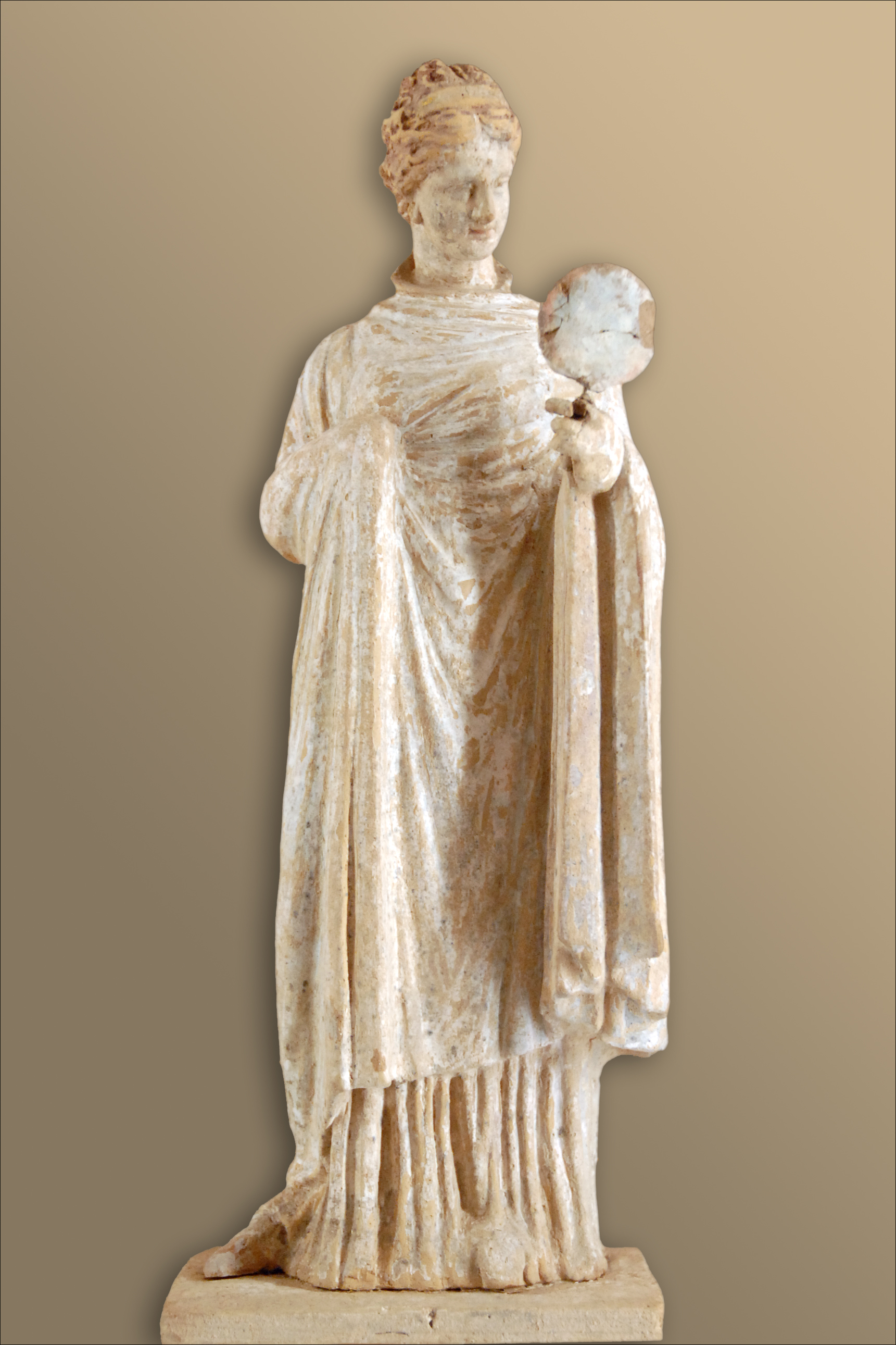 Femme au miroir Tanagra Grèce antique Fin IVè-IIIe siècle avant J.-C. Terre cuite Site du musée